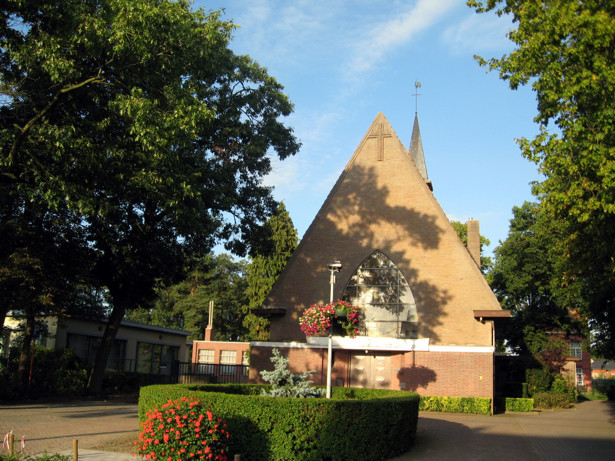 Parochiekerk Onze-Lieve-Vrouw van de Heilige Rozenkrans in Weelde-Station, Weelde